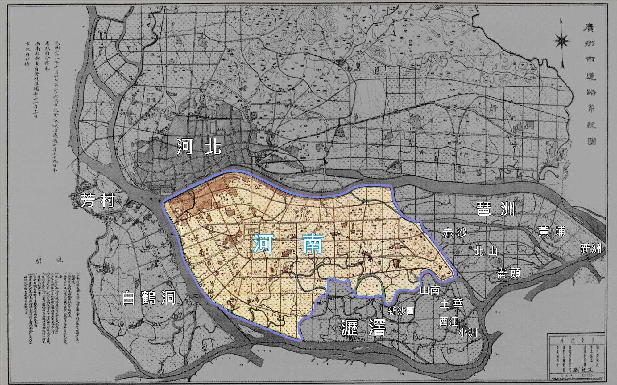 广州河南的范围示意